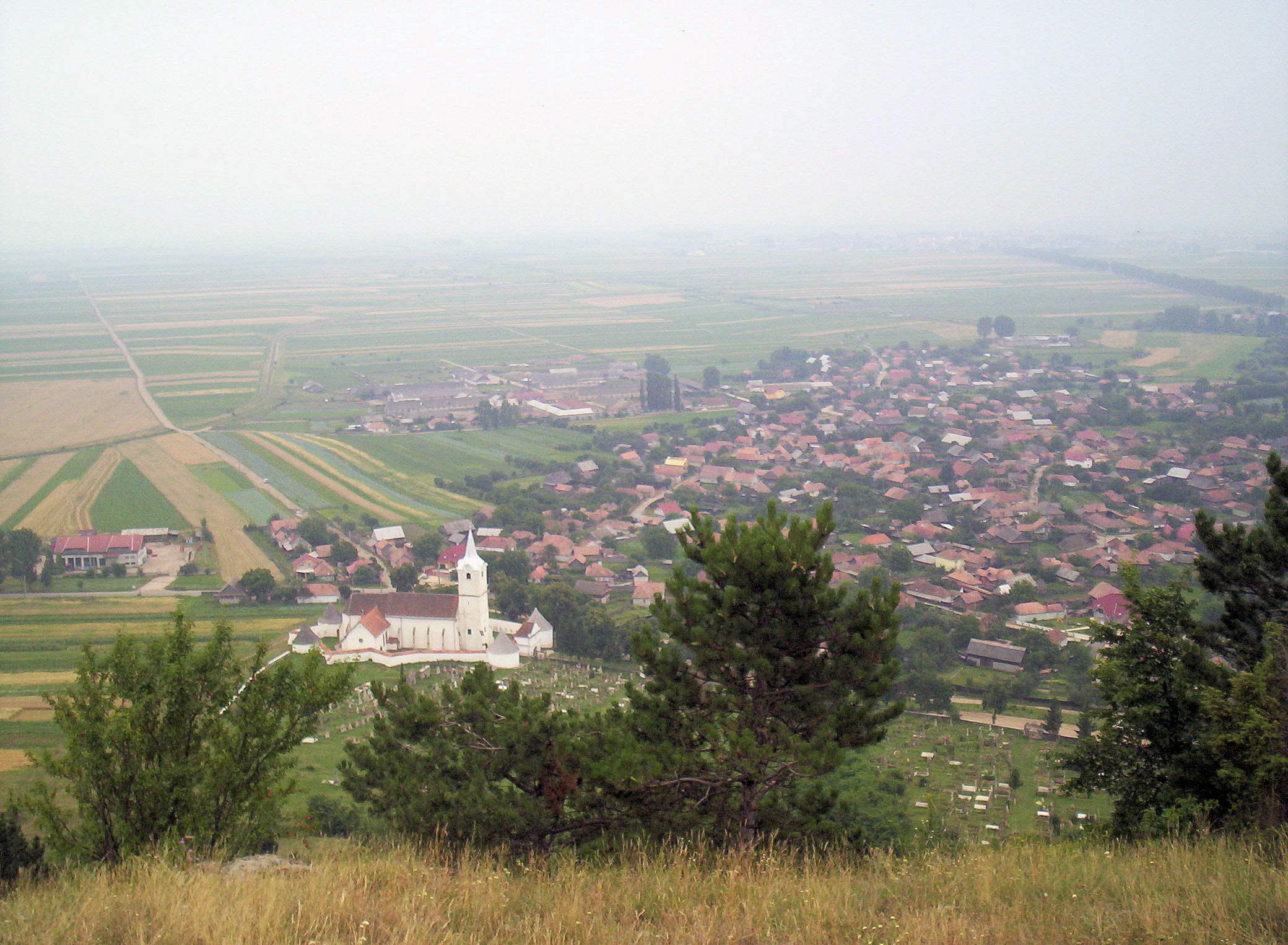 Kézdiszentlélek látképe a Perkőről – photo taken by uploader User:Csanády in 2006.